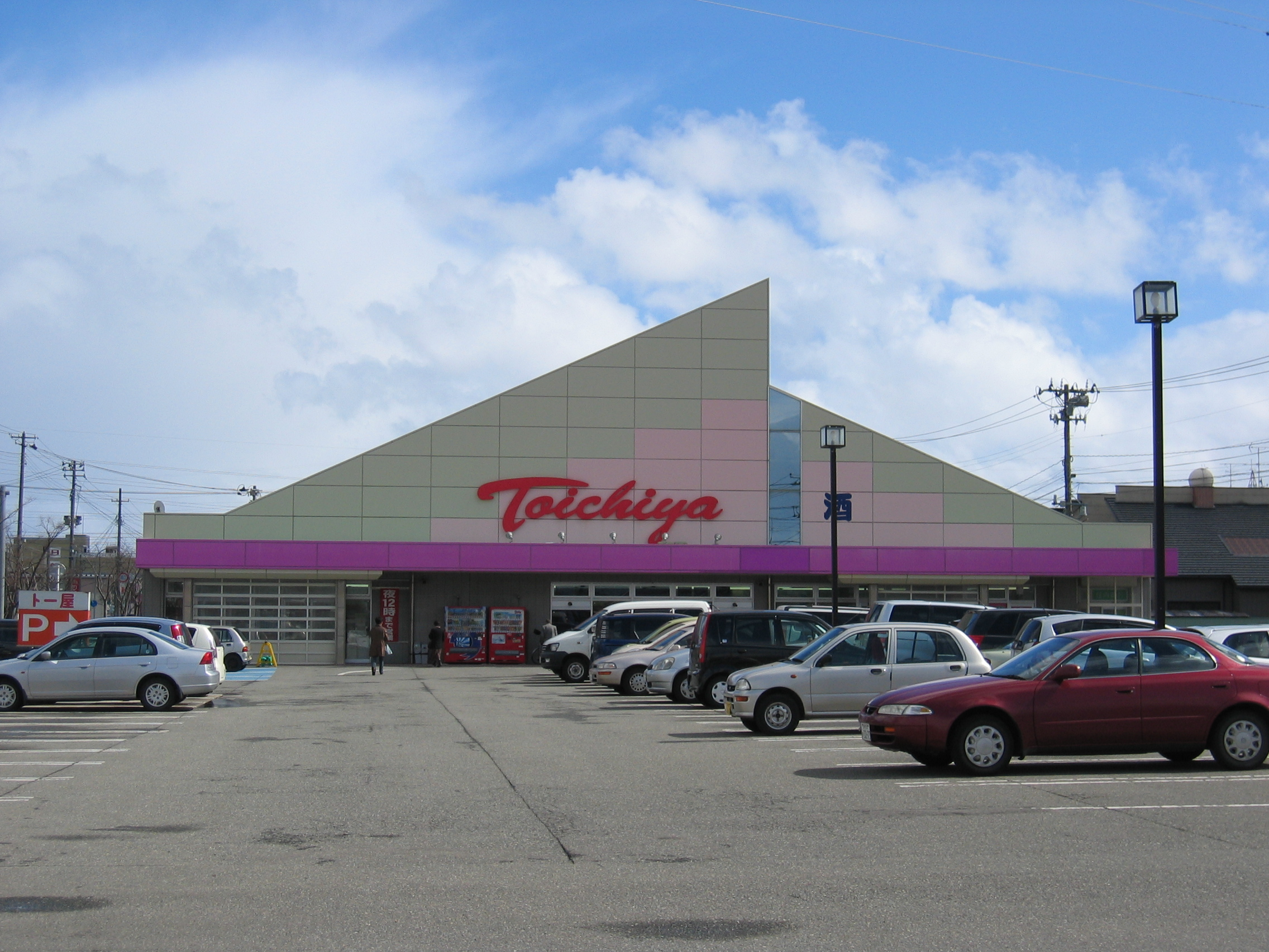 ト一屋 みずほ通り店